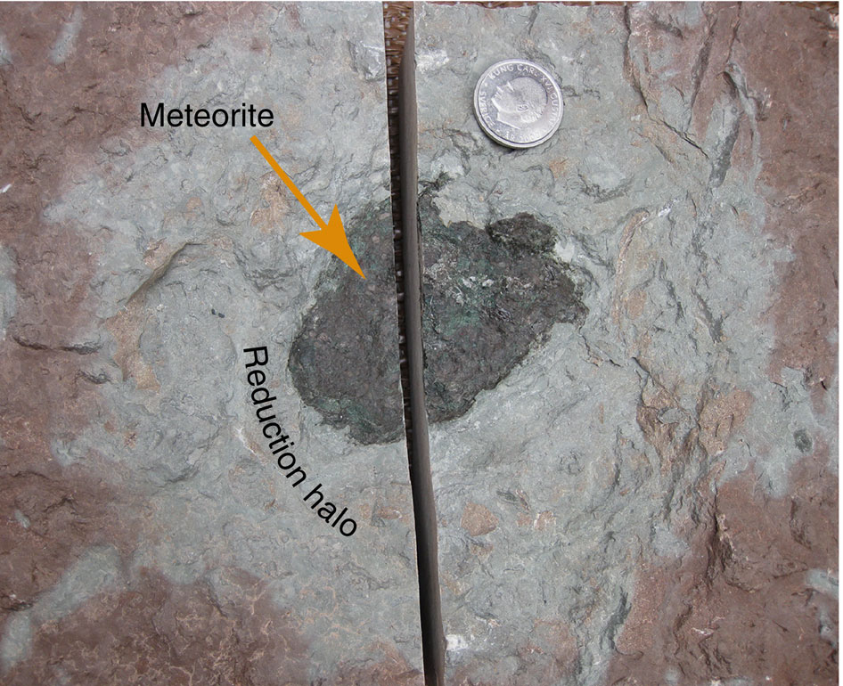 Österplana 065 fossil meteorite.